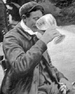 Henri Fournier buvant une bière à son arrivée à Berlin (La Vie au Grand Air du 7 juillet 1901)